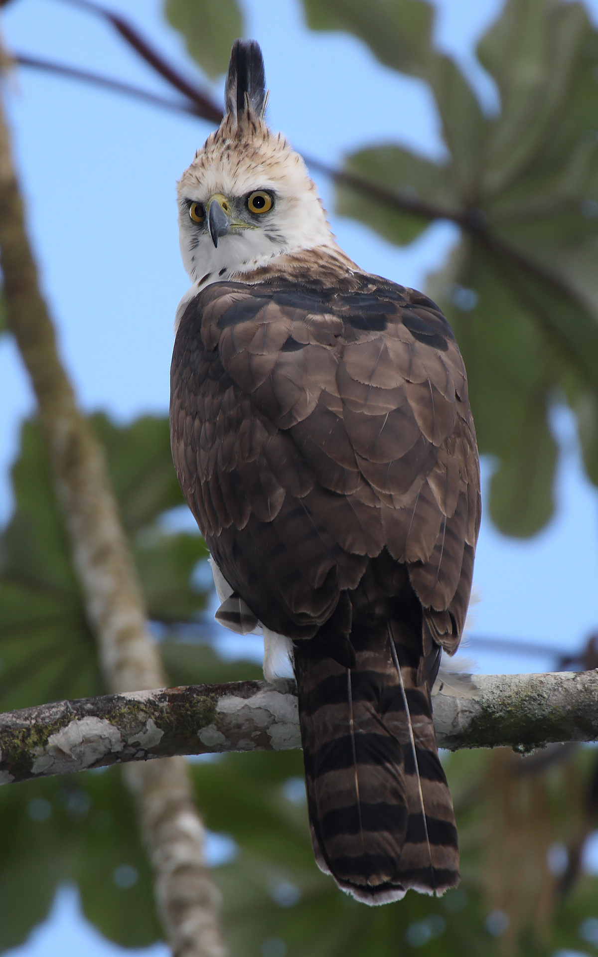 Ornate Hawk Eagle (immature) -- Parque Nacional Darién, Panama -- 2008 February